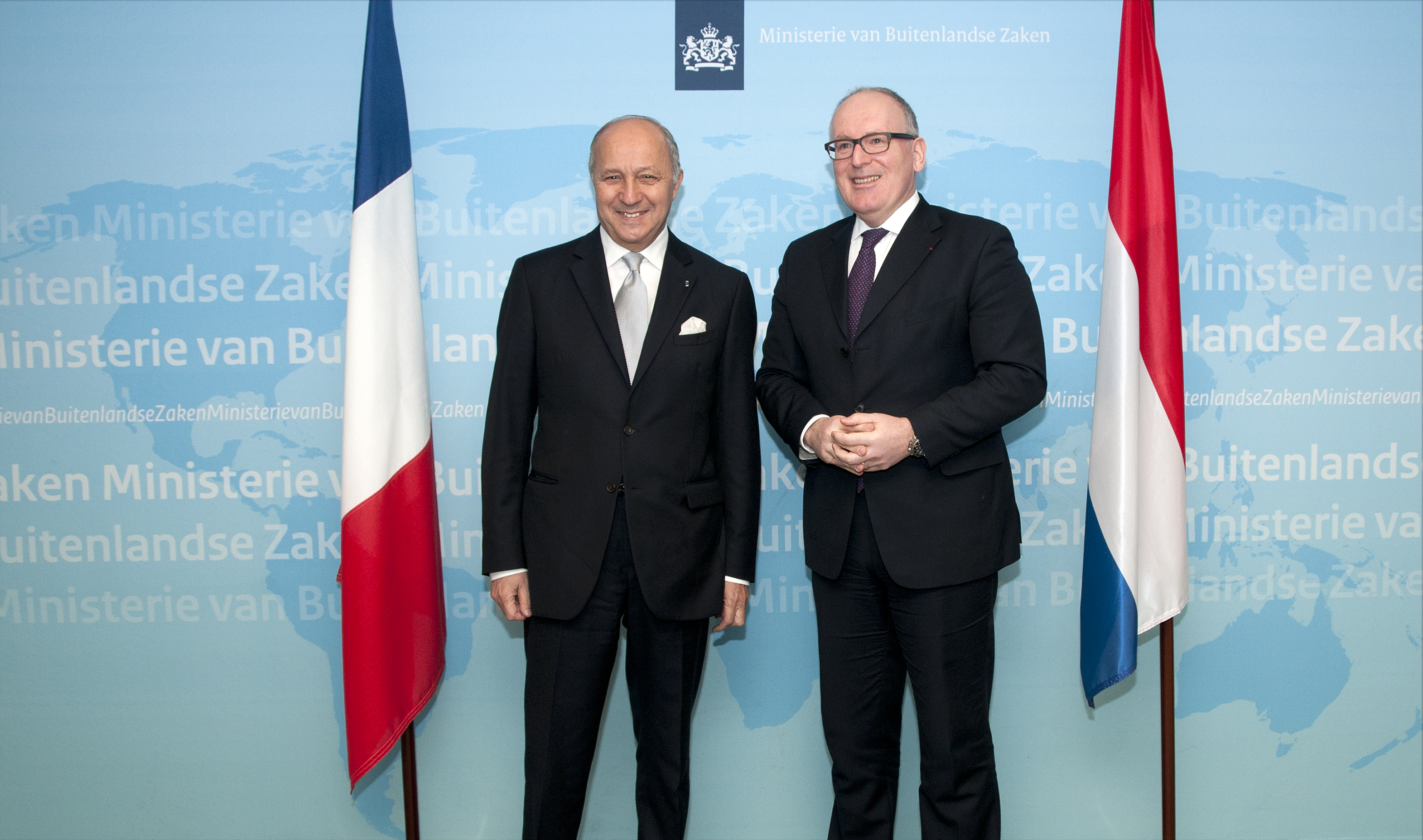 130321 Fabius BZ Frankrijk bij Timmermans 1483